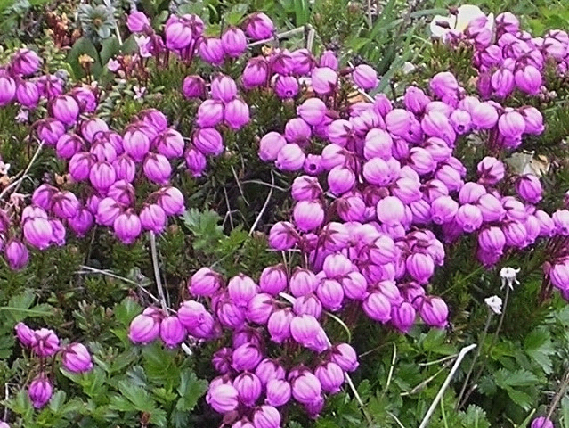 エゾノツガザクラ （北海道大雪山）Phyllodoce caerulea (Mt. Daisetsu, Hokkaido, Japan)